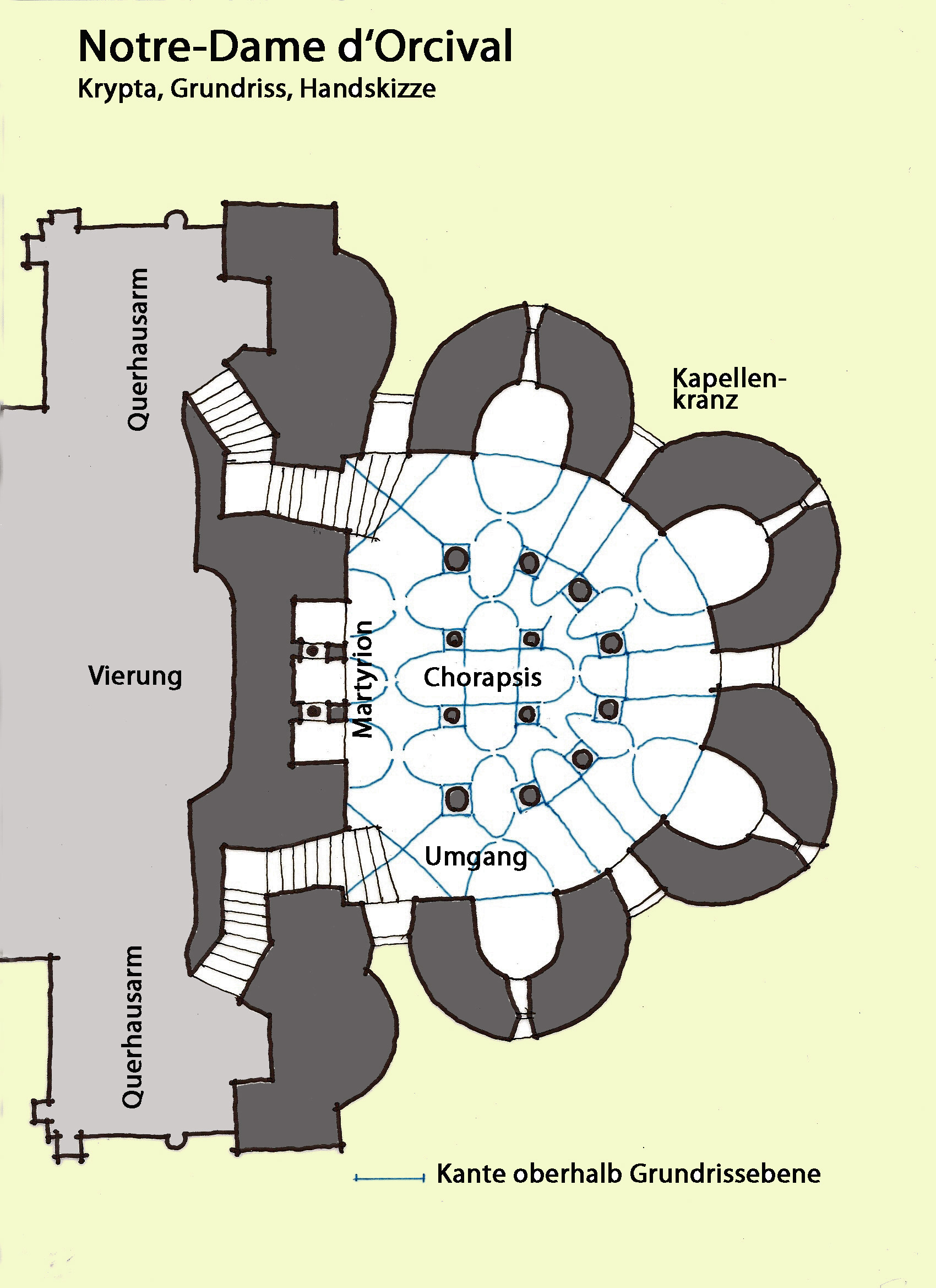 N.-D. d'Orcival, Grundriss Krypta, Handskizze